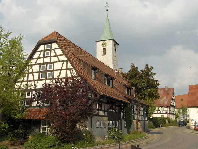 Bücherei, eh. Gasthaus Krone, mit ev. Kirche und Pfarrhaus im Hintergrund